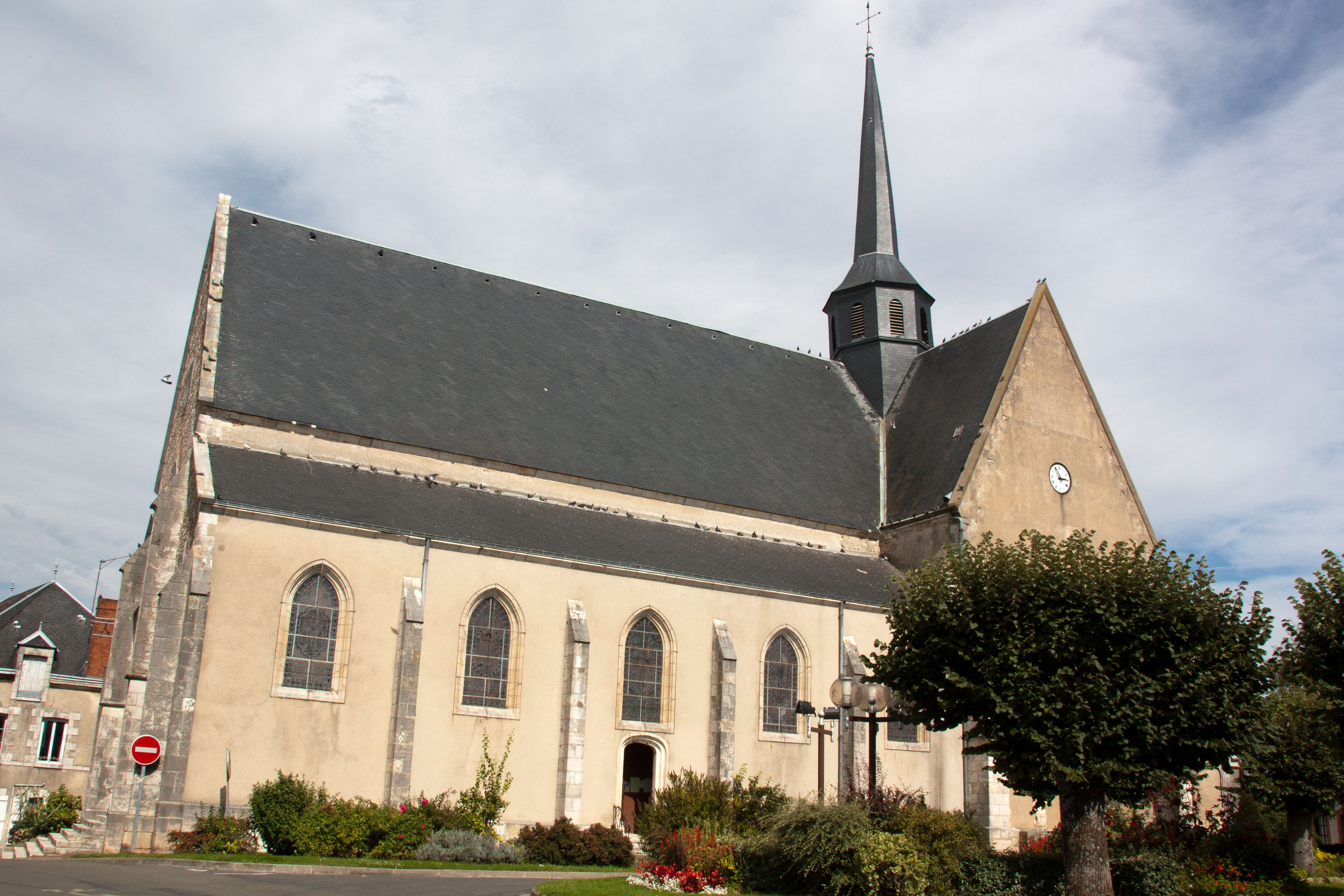 Église Saint-Étienne de Coullons, Coullons, Loiret, France